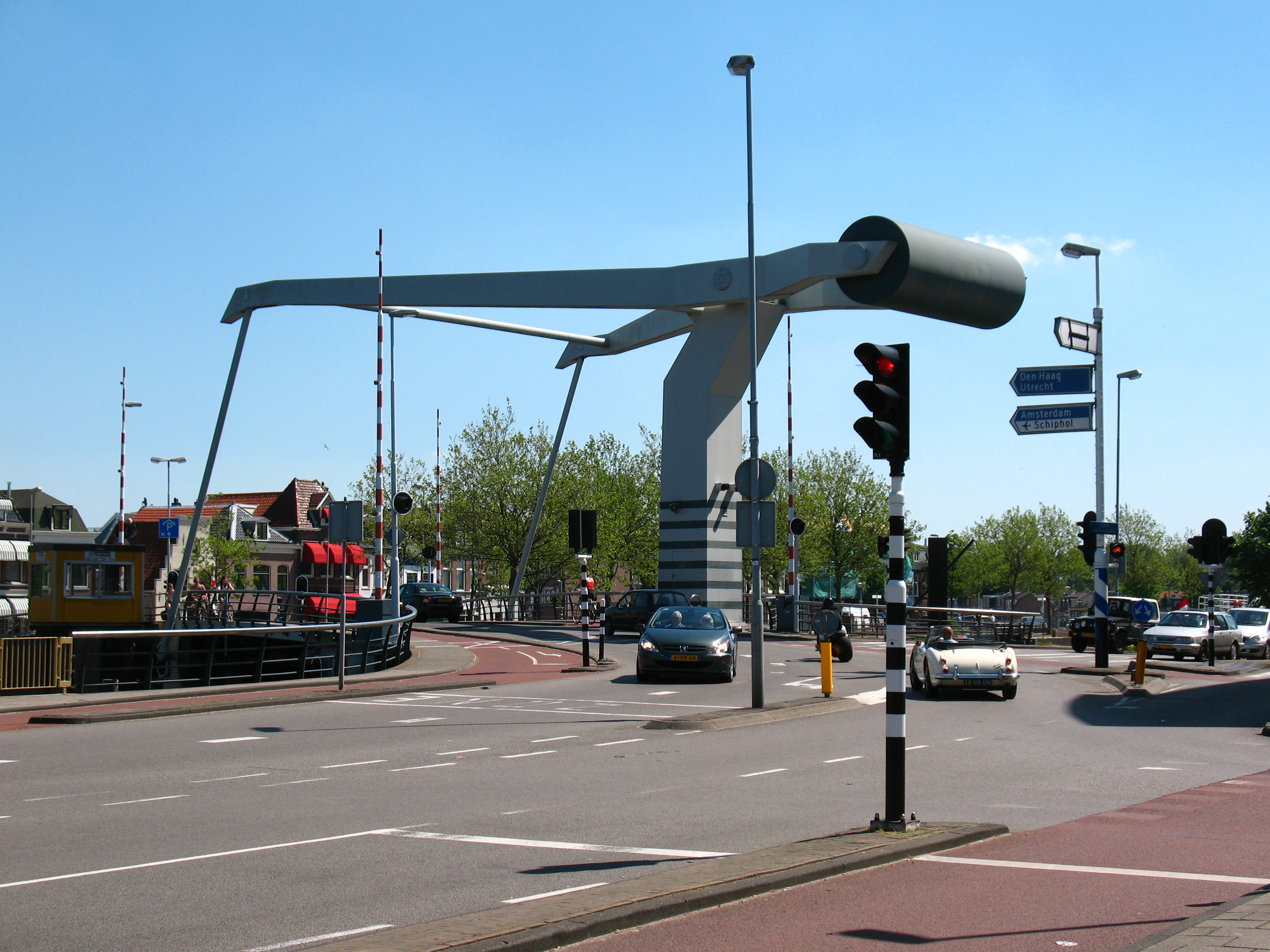 Verfrollerbrug aan het Spaarne in Haarlem, Netherlands